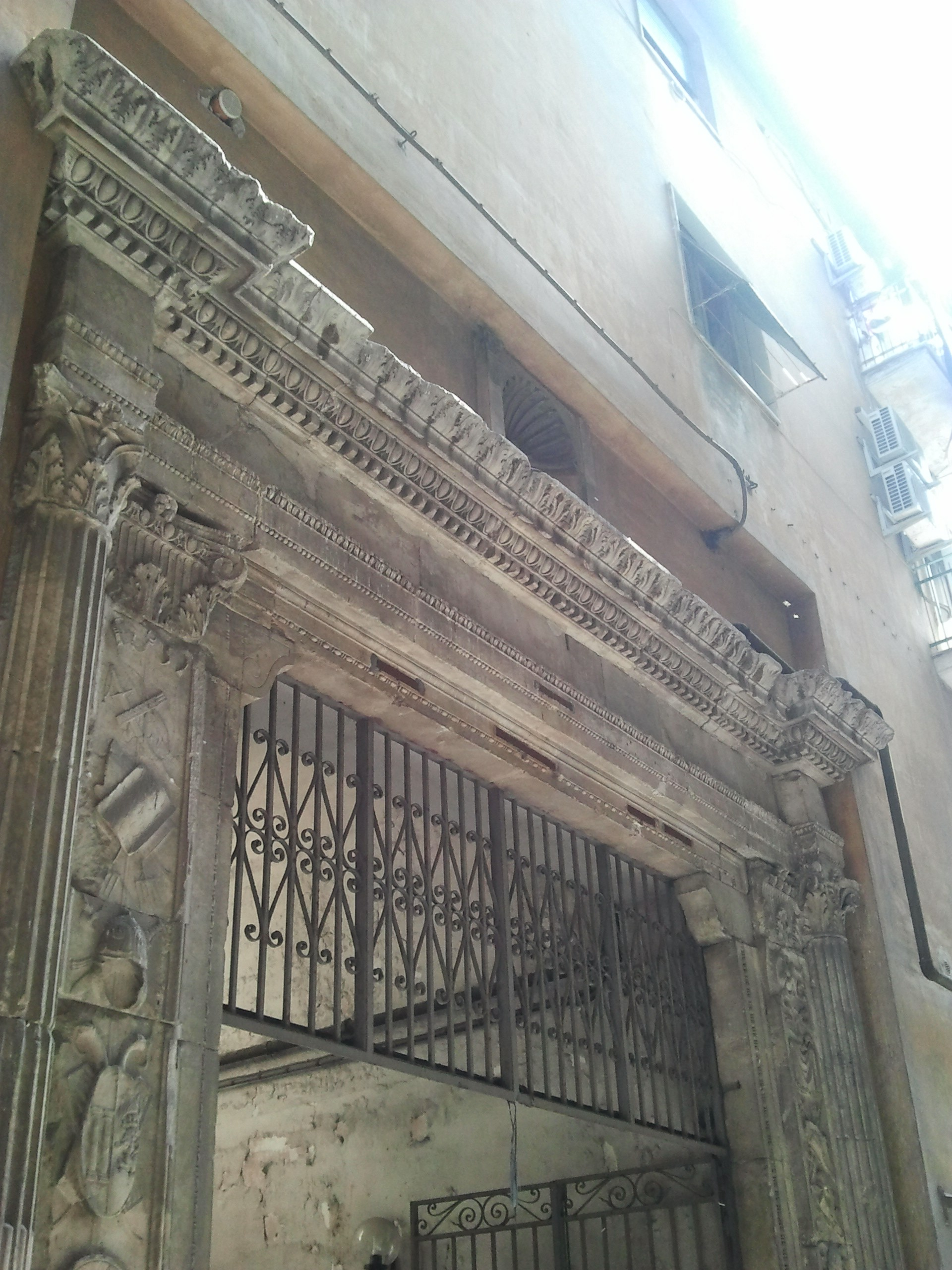 Portale del palazzo De Scorciatis in vico Cinquesanti a Napoli